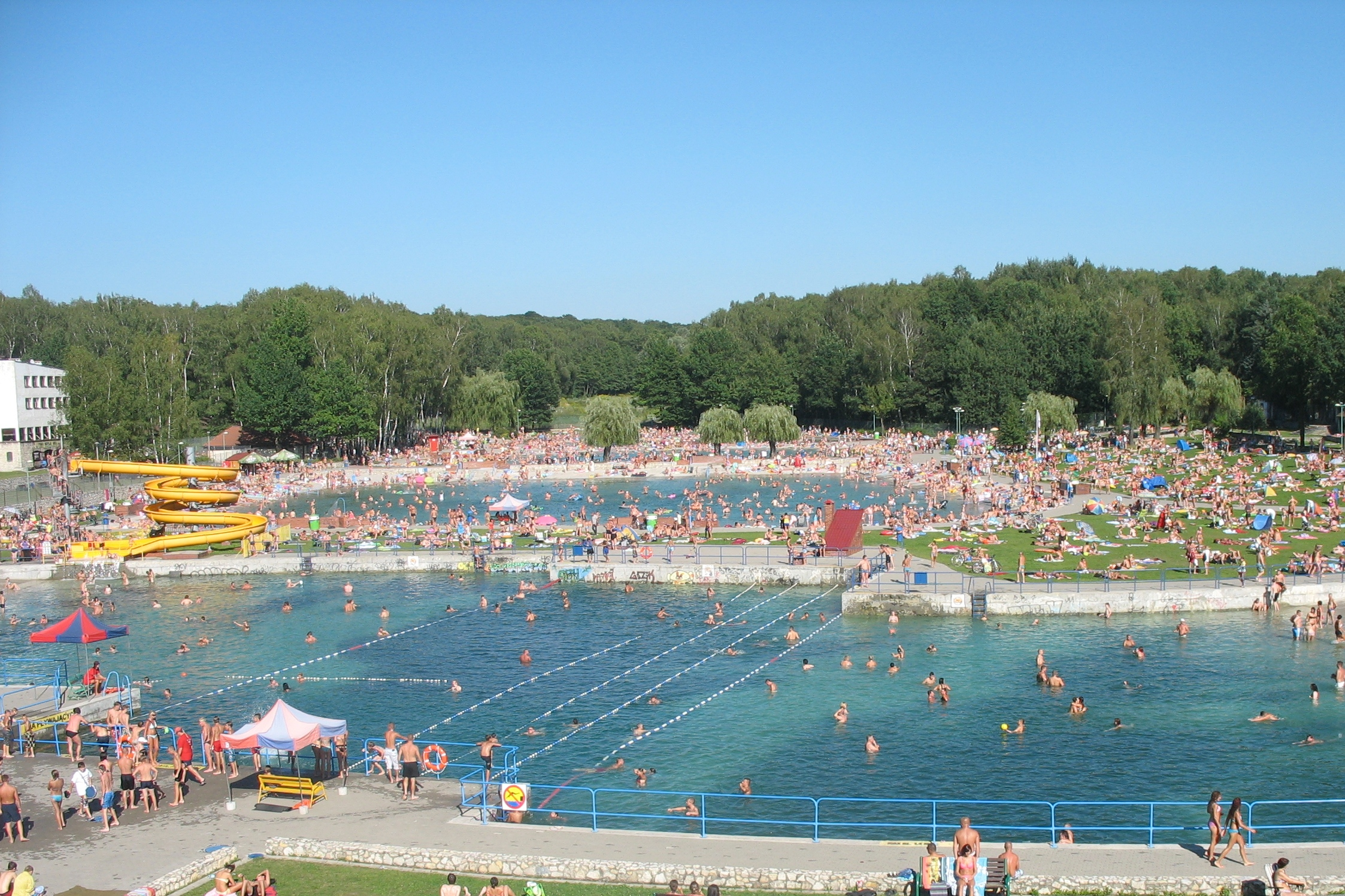 Kąpielisko Leśne w Gliwicach.